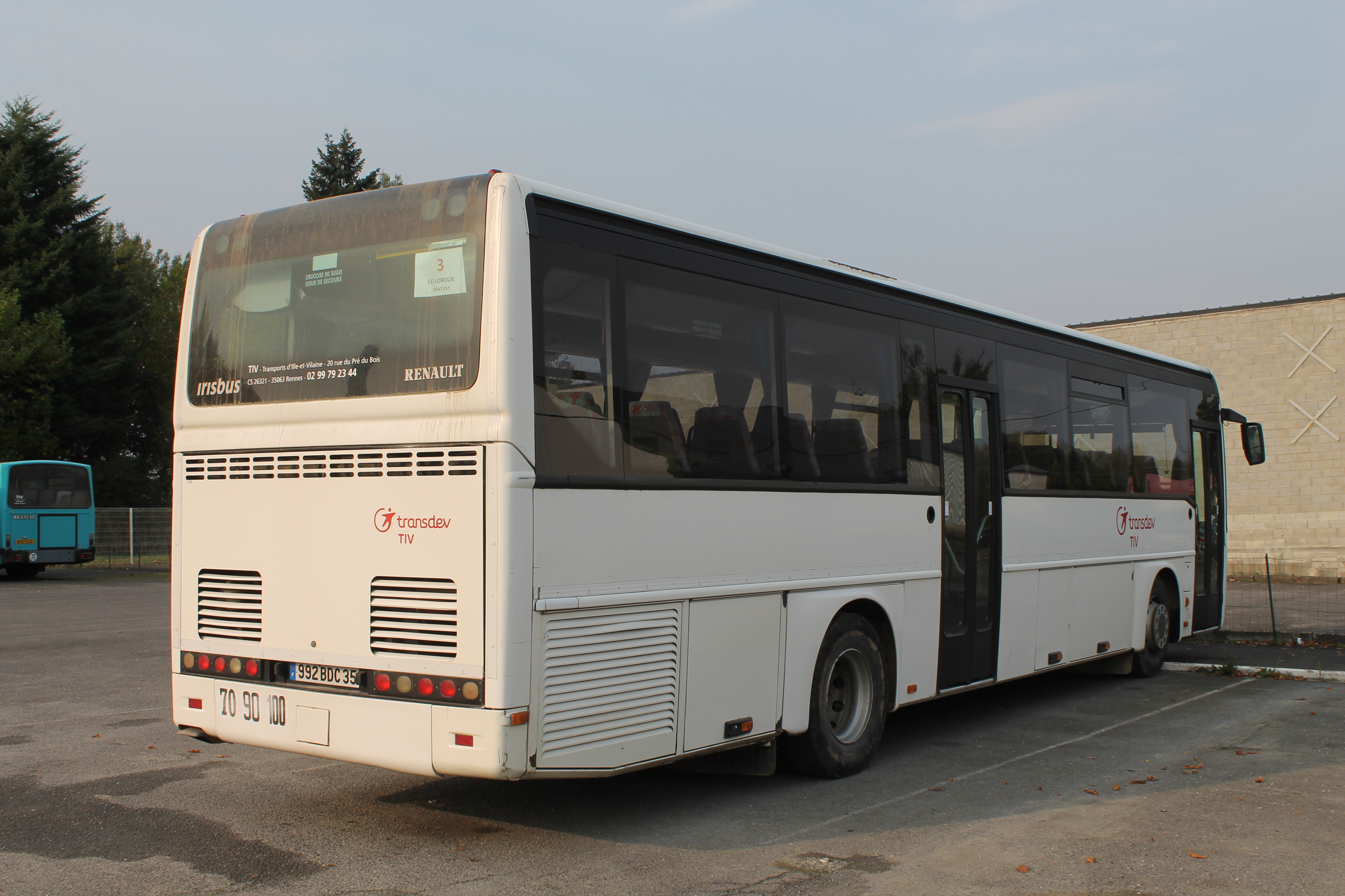 Irisbus Ares Line vue arrière